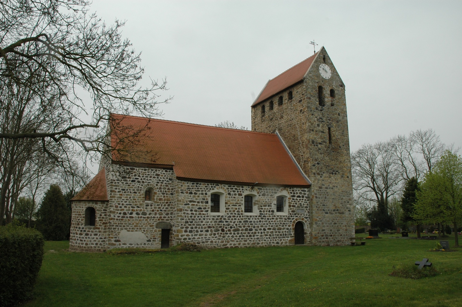 Außenansicht der Kirche in Zeddenick, Ortsteil von Möckern